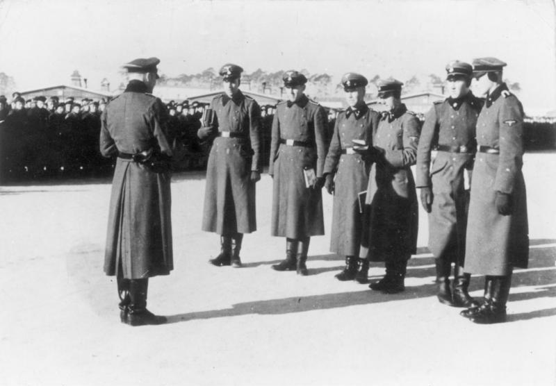 Zentralbild 9.12.1960 Zur Einweihung der Mahn- und Gedenkstätte Sachsenhausen am 23. April 1961. - Vor den Toren Berlins, auf dem Gelände des ehemaligen faschistischen Konzentrationslagers Sachsenhausen bei Oranienburg, in das von 1936 bis Kriegsende 200.000 Menschen verschleppt wurden, entsteht - wie in Buchenwald und Ravensbrück - eine würdige Mahn- und Gedenkstätte. Jeder Quadratmeter Boden ist hier vom Blut der 100.000 Toten durchtränkt, die im KZ Sachsenhausen mit seinen 73 aussenkommandos erschlagen, erhängt, erschossen, zu Tode geprügelt, durch erbarmunslose Sklavenarbeit zu Grunde gerichtet und vergast wurden. Doch gelang es den SS-Mördern nicht, den Widerstandswillen der politischen Häftlinge zu brechen. So wurde Sachsenhausen auch zur Stätte der großen internationalen Solidarität und des mutigen Kampfes gegen Faschismus und Krieg. UBz: Einige der berüchtigsten Schläger und Mörder im KZ-Sachsenhausen während eines Zählappells. Von links nach rechts: SS-Hauptscharführer (Rappordführer) Campe SS-U-Scharführer (Blockführer) Meyer SS-U-Scharführer (Blockführer) Saathoff SS-Hauptscharführer (Blockführer) Hohmann SS-Scharführer (Blockführer) Krämer SS-U-Scharführer (Blockführer) Schröter SS-U-Scharführer (Blockführer) Seifert (Aufnahme wurde bei SS-Banditen gefunden)